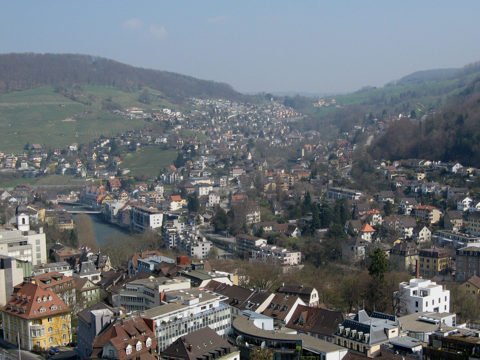 Ennetbaden, von der Ruine Stein aus gesehen